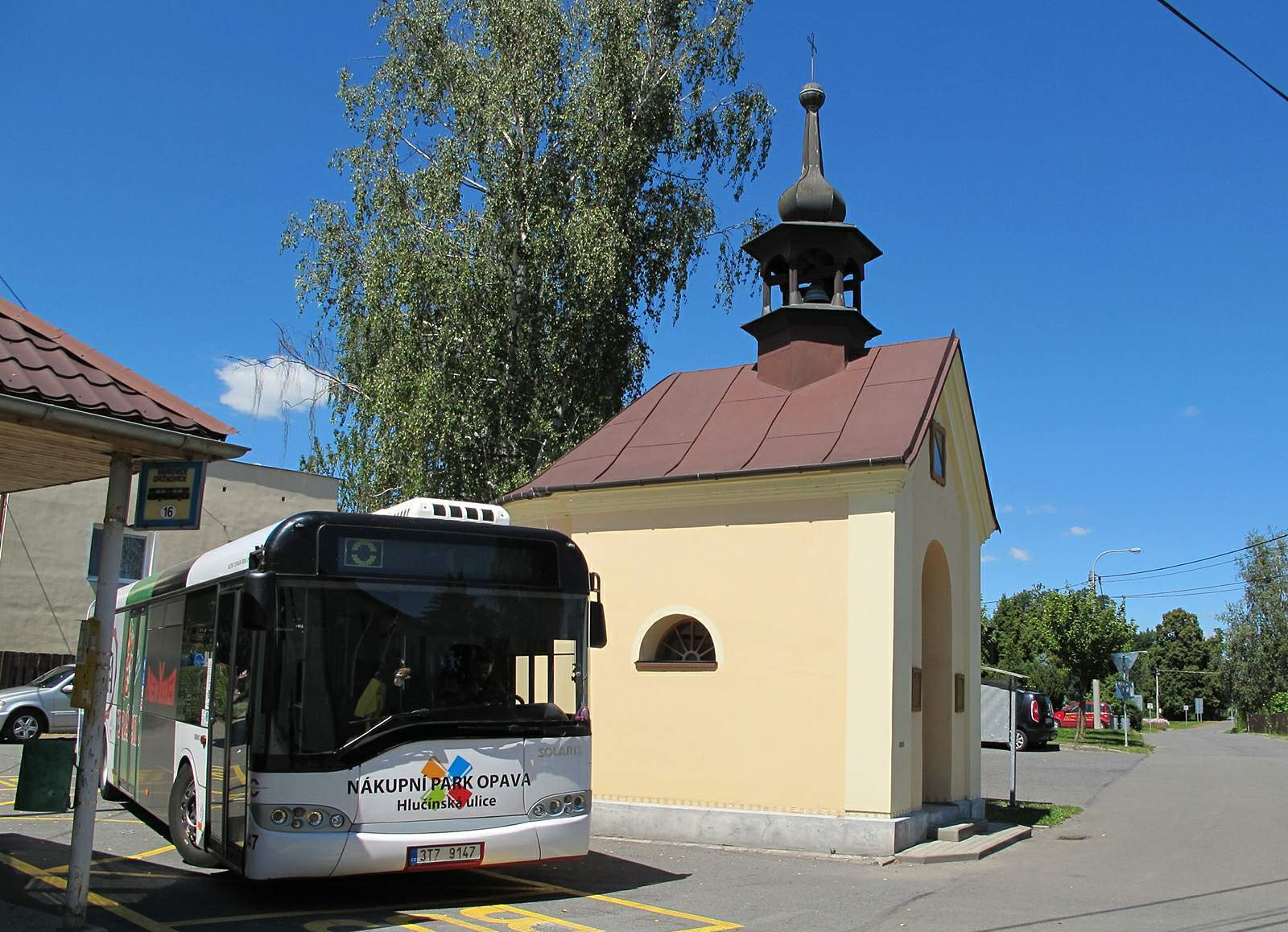 Zvonička, náves, parc. č. 1, Držkovice.